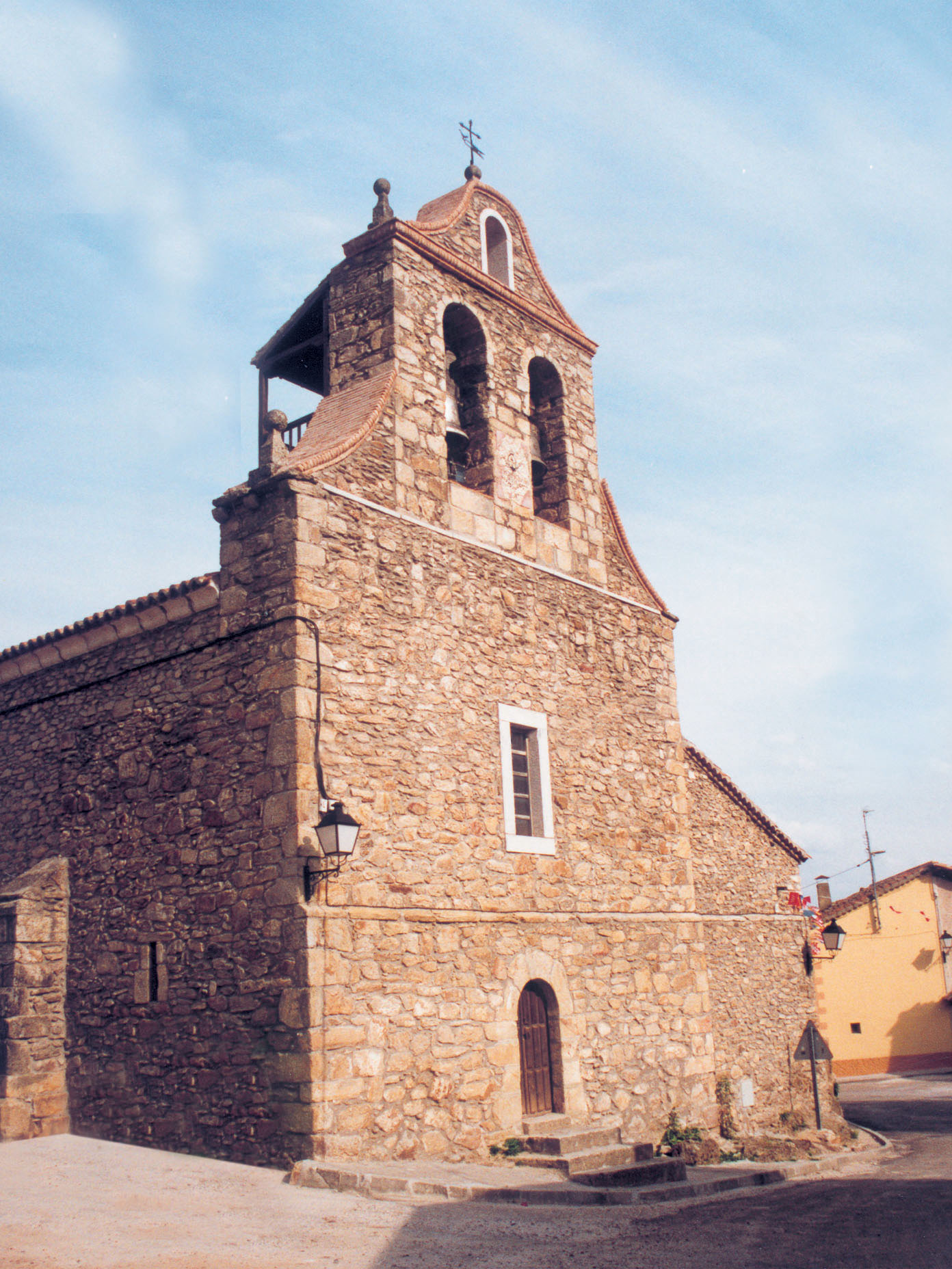 Campanario de iglesia en Horcajuelo de la Sierra.